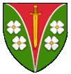 Gemeindewappen von Ottenthal, Niederösterreich